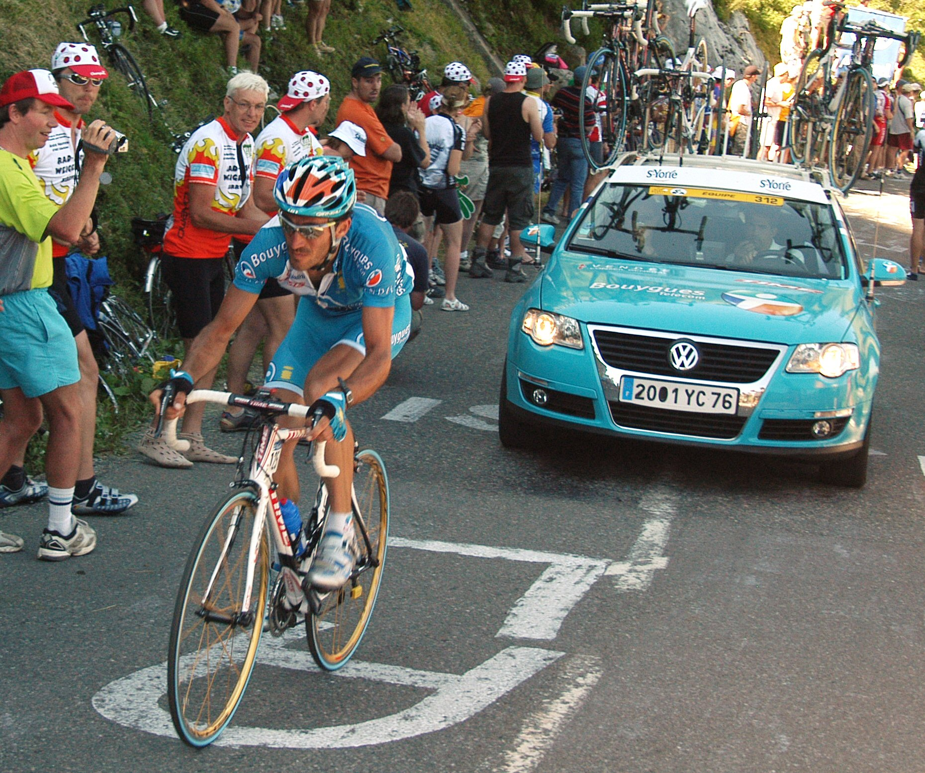 Laurent Lefèvre at stage 7 of the Tour de France 2007 on the Col de la Colombière.